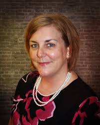 Yolaine Arseneau est la nouvelle directrice générale du Cégep de la Gaspésie et des Îles. Photo: Gracieuseté.